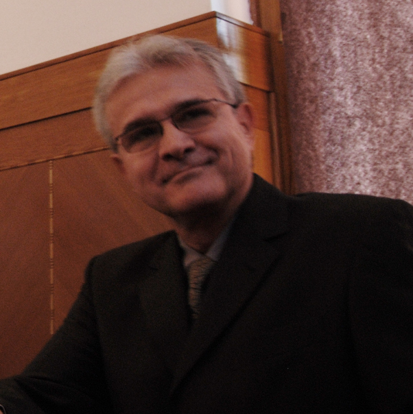 Štefan Bučko